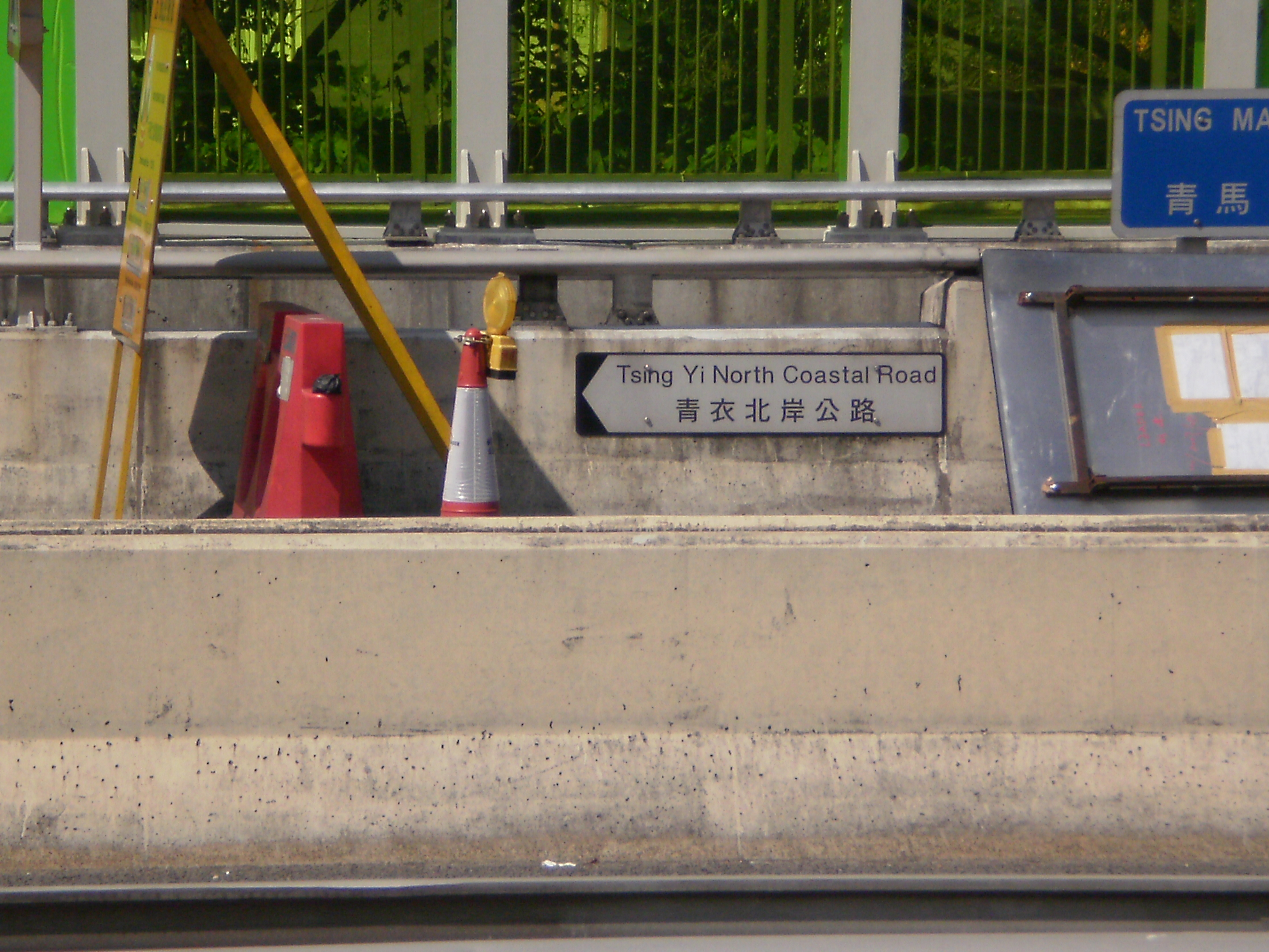 中文（香港）: 青衣北岸公路往青荃橋方向。